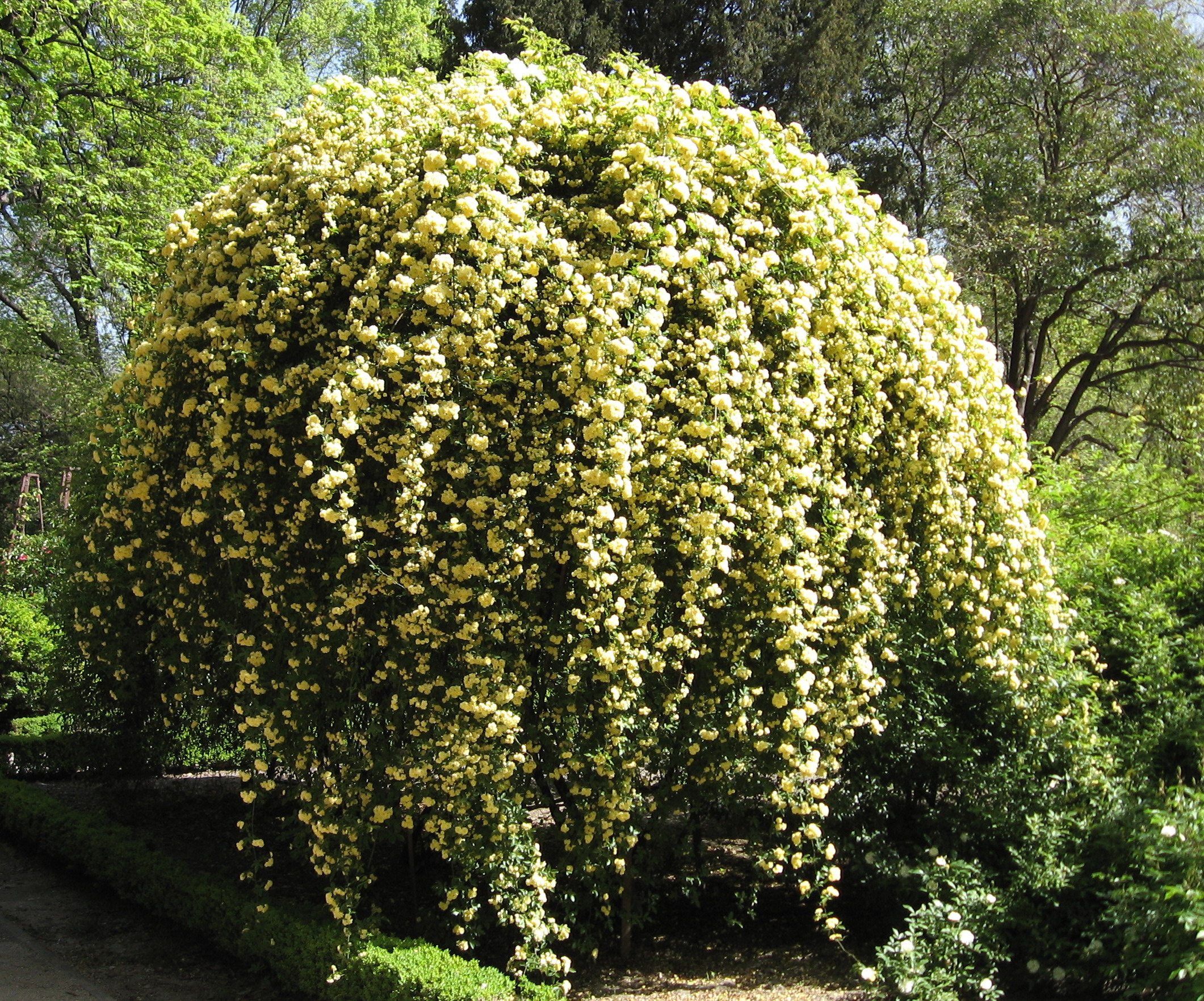 Rosa banksiae 'Lutea', sect. Banksianae. Real Jardín Botánico de Madrid. A. Barra.